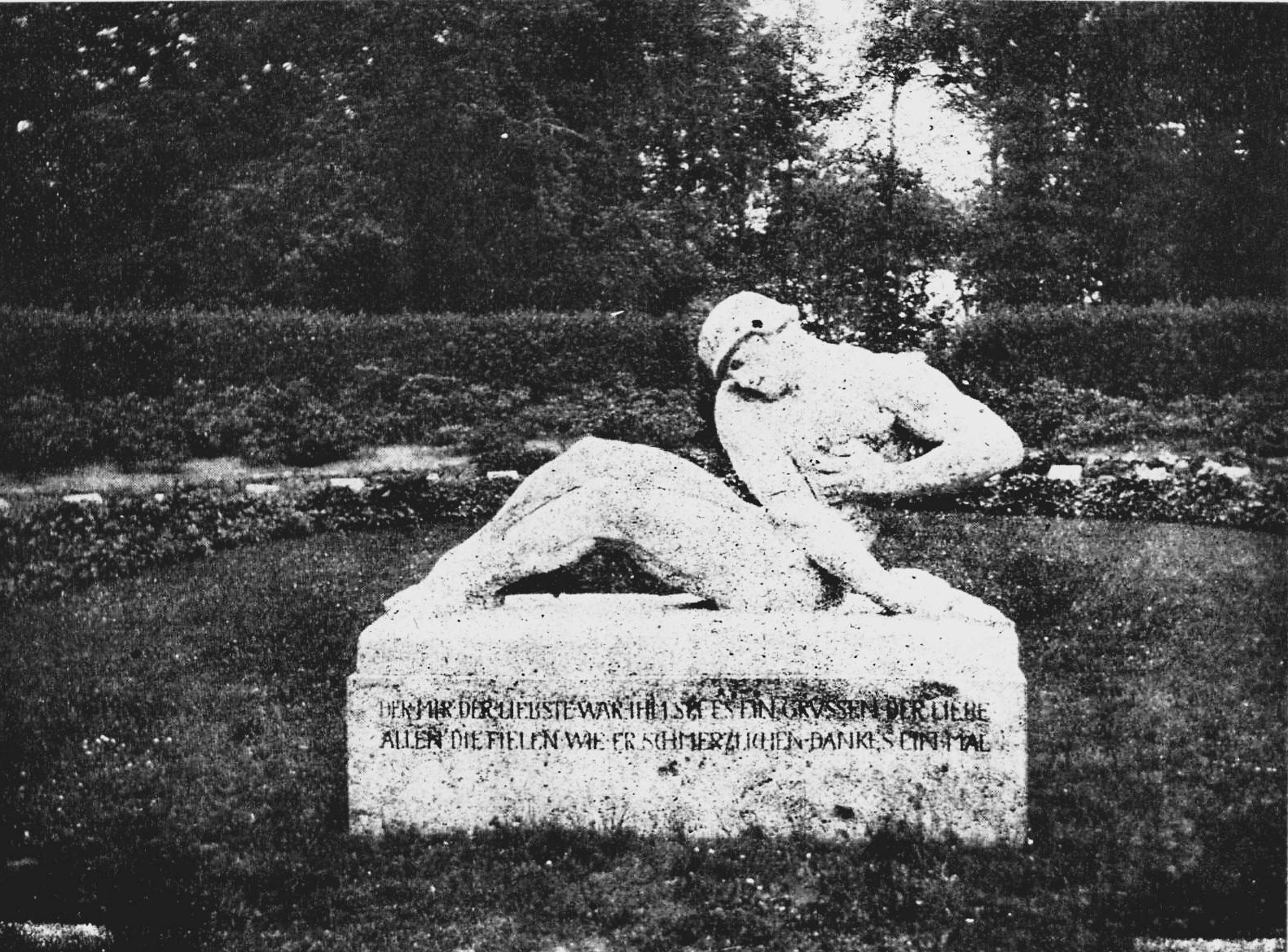 Der Sterbende Krieger. Ist Denkmal für den gefallenen Hauptmann und Rechtsanwalt Dr. Küstermann. Es wurde von Fritz Behn, dessen Schwager der Gefallene war, erschaffen. Das Denkmal ist eine Stiftung der Witwe Küstermanns.